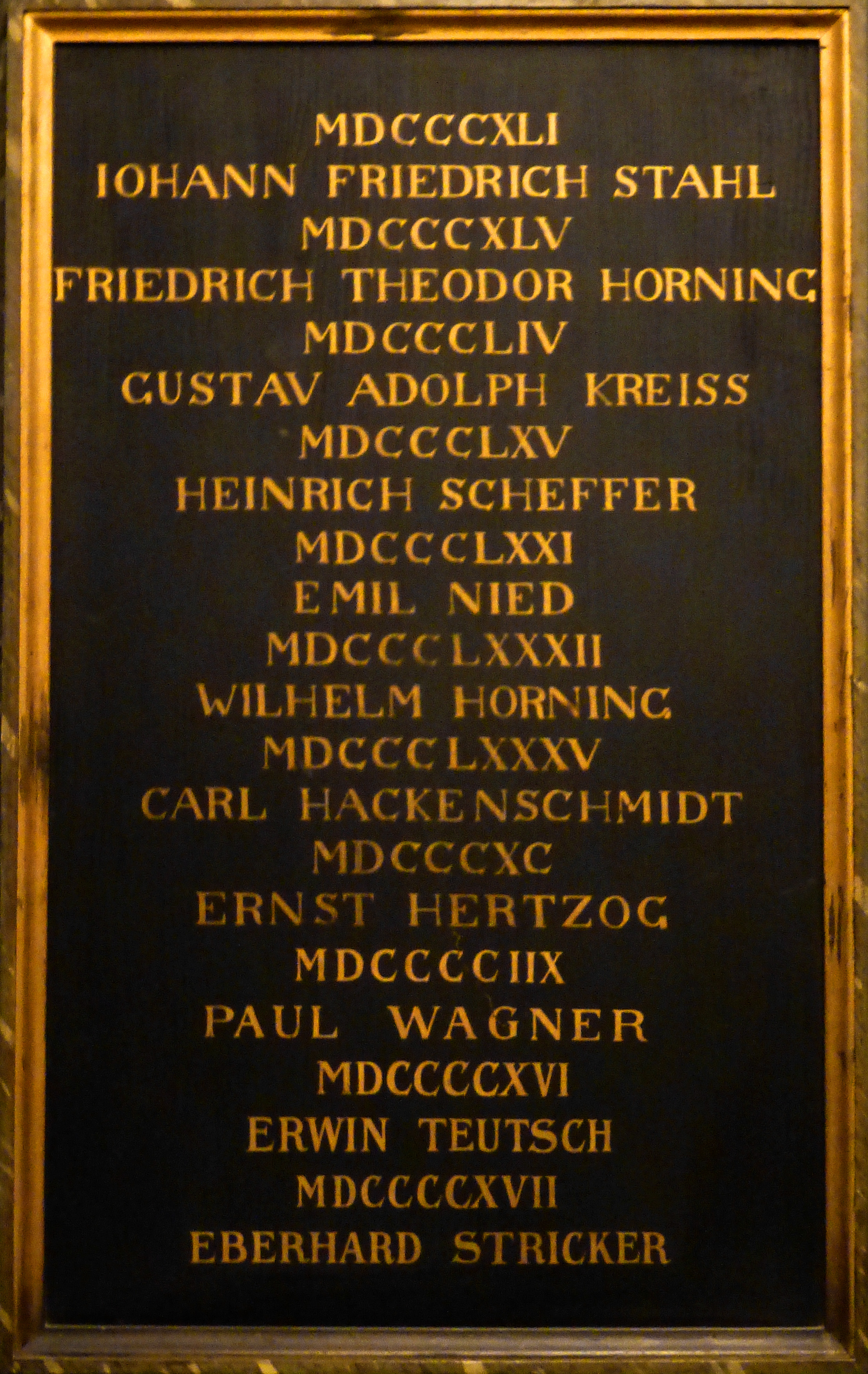 Strasbourg, église protestante Saint-Pierre-le-Jeune : liste des pasteurs depuis la Réforme